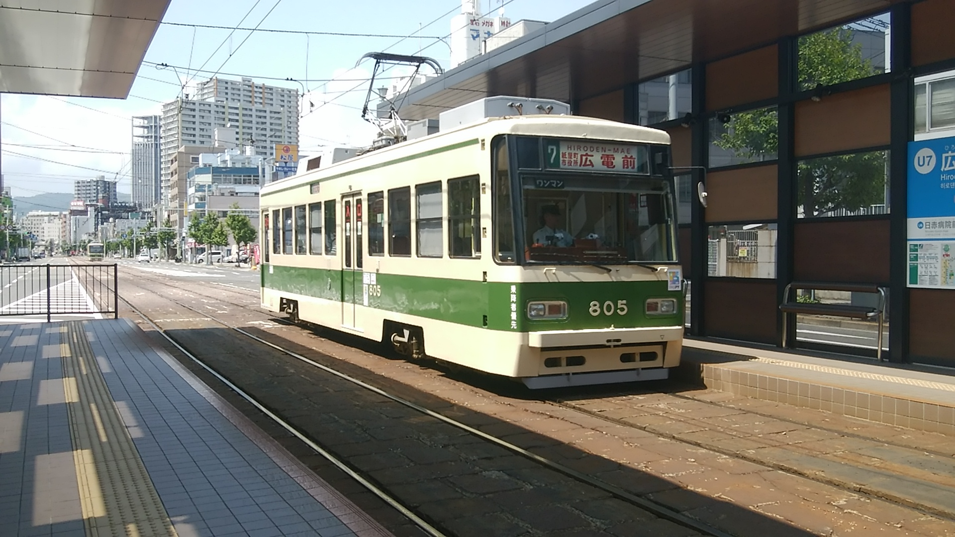 vvvf更新後の805号